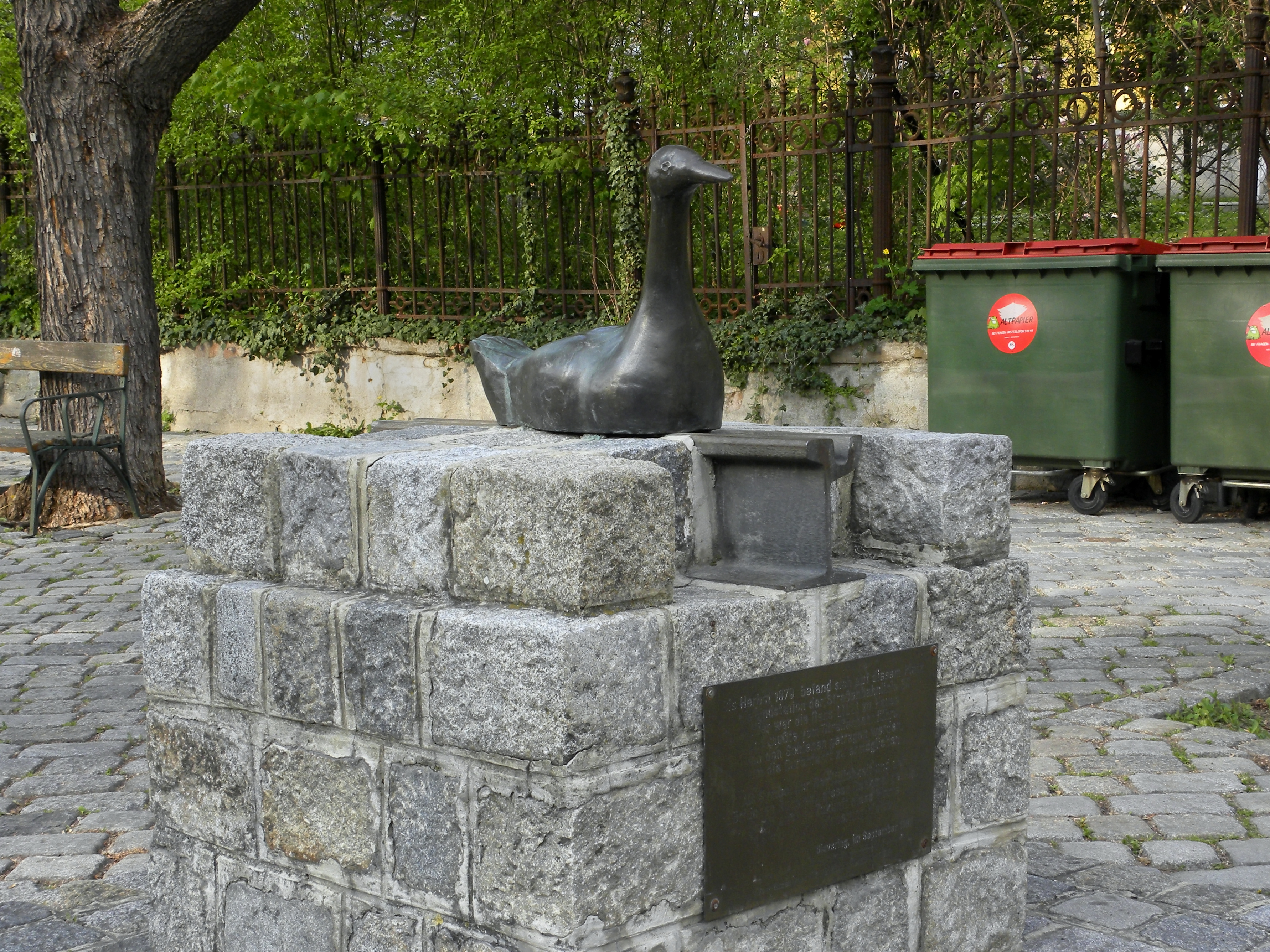 Als es in Wien bis 30. August 1970 noch die Straßenbahnlinie 39 gab, welche hier die Endstelle hatte, lebte da die Gans Lilli. Mit Vorliebe saß sie auf den Straßenbahnschienen und der Fahrer mußte sie zur Seite tragen, um durchfahren zu können; anschließend belegte sie ihren Platz wieder. Im Jahr 1987 wurde schließlich dieses Denkmal für Lilli gesetzt, um sie als ein Symbol für dörfliche Ruhe und Gemütlichkeit in Sievering in Erinnerung zu behalten.